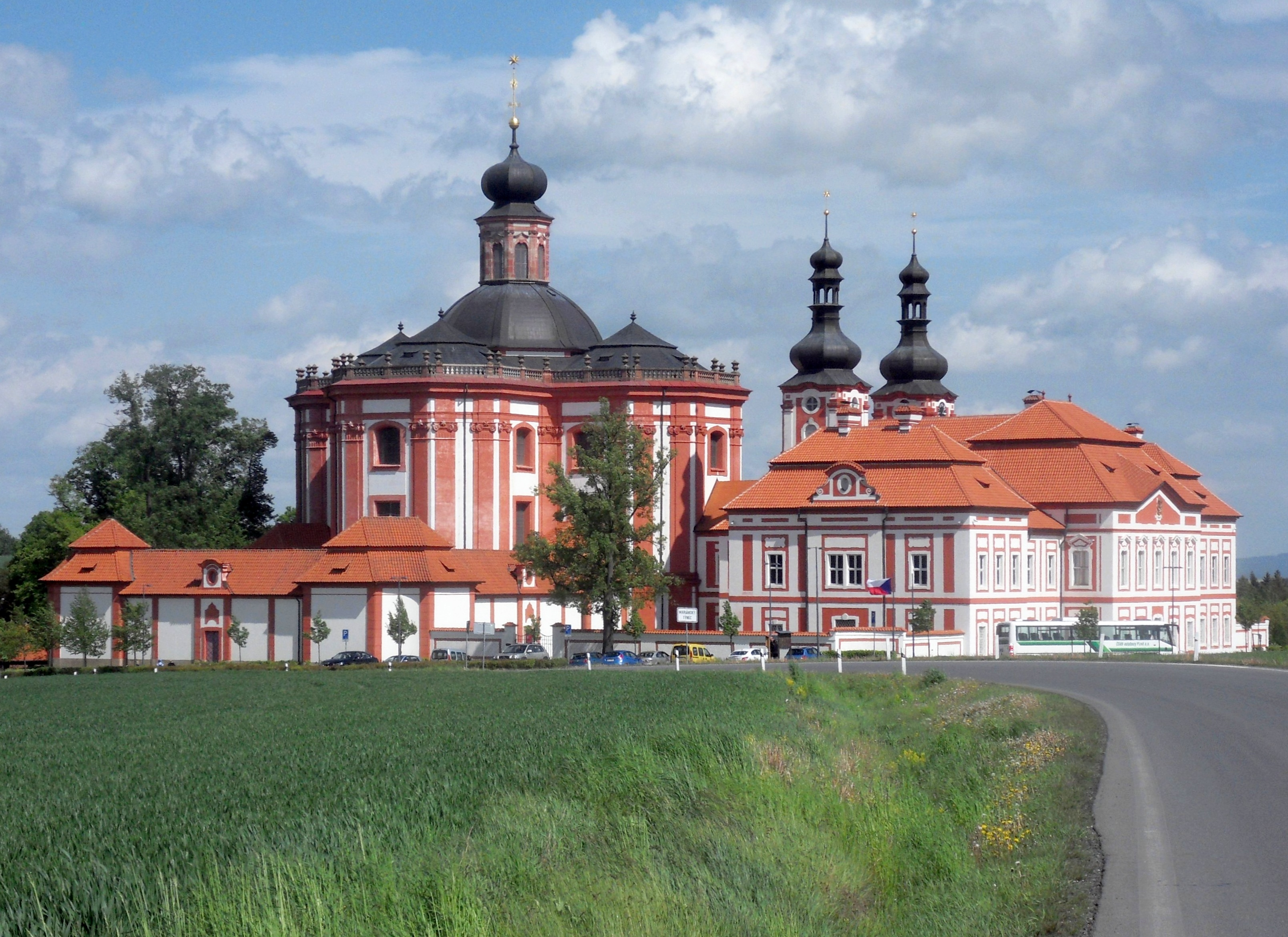 Proboštství s kostelem Zvěstování Panny Marie - pohled od západu, Mariánský Týnec 1, Mariánský Týnec.